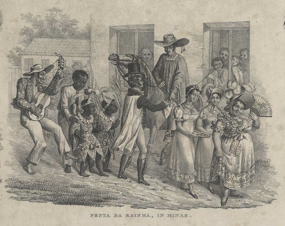 "Festa da Rainha in Minas", detail of "Bilder aus dem Menschenleben"